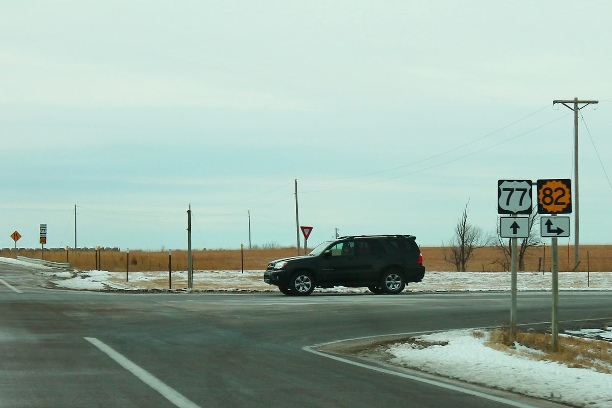 US77sRoad-US77KS82Signs